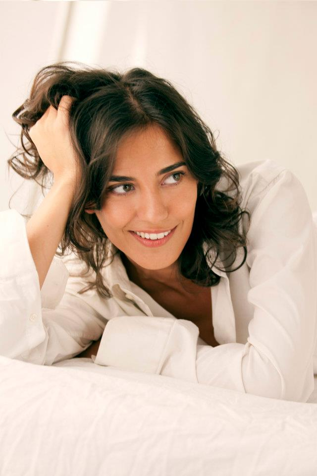 Actriz Verónica Moral